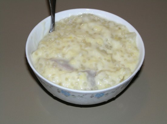 Sago pudding with Taro